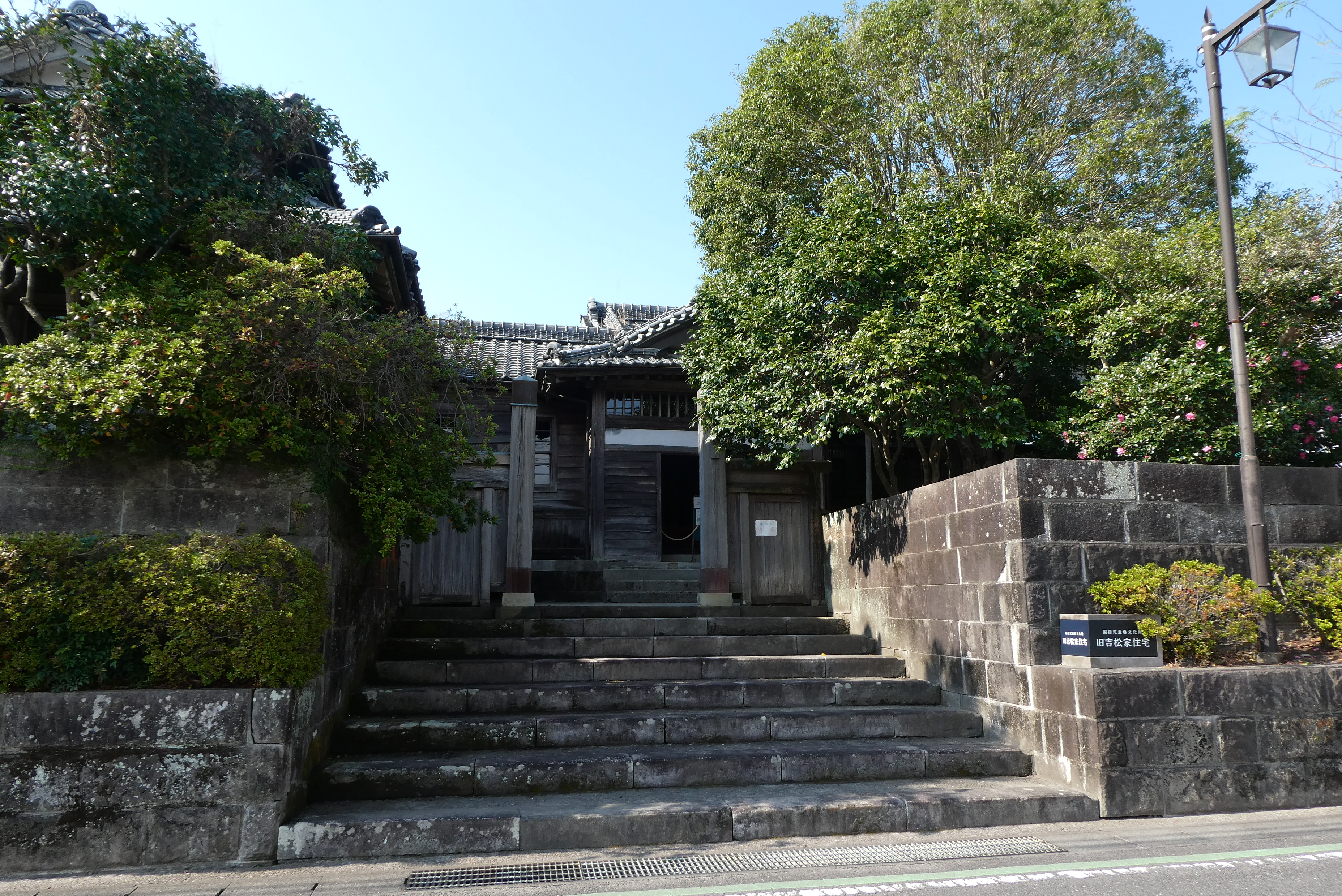 宮崎県串間市にある旧吉松家住宅の正面玄関です。 2018.11.18撮影